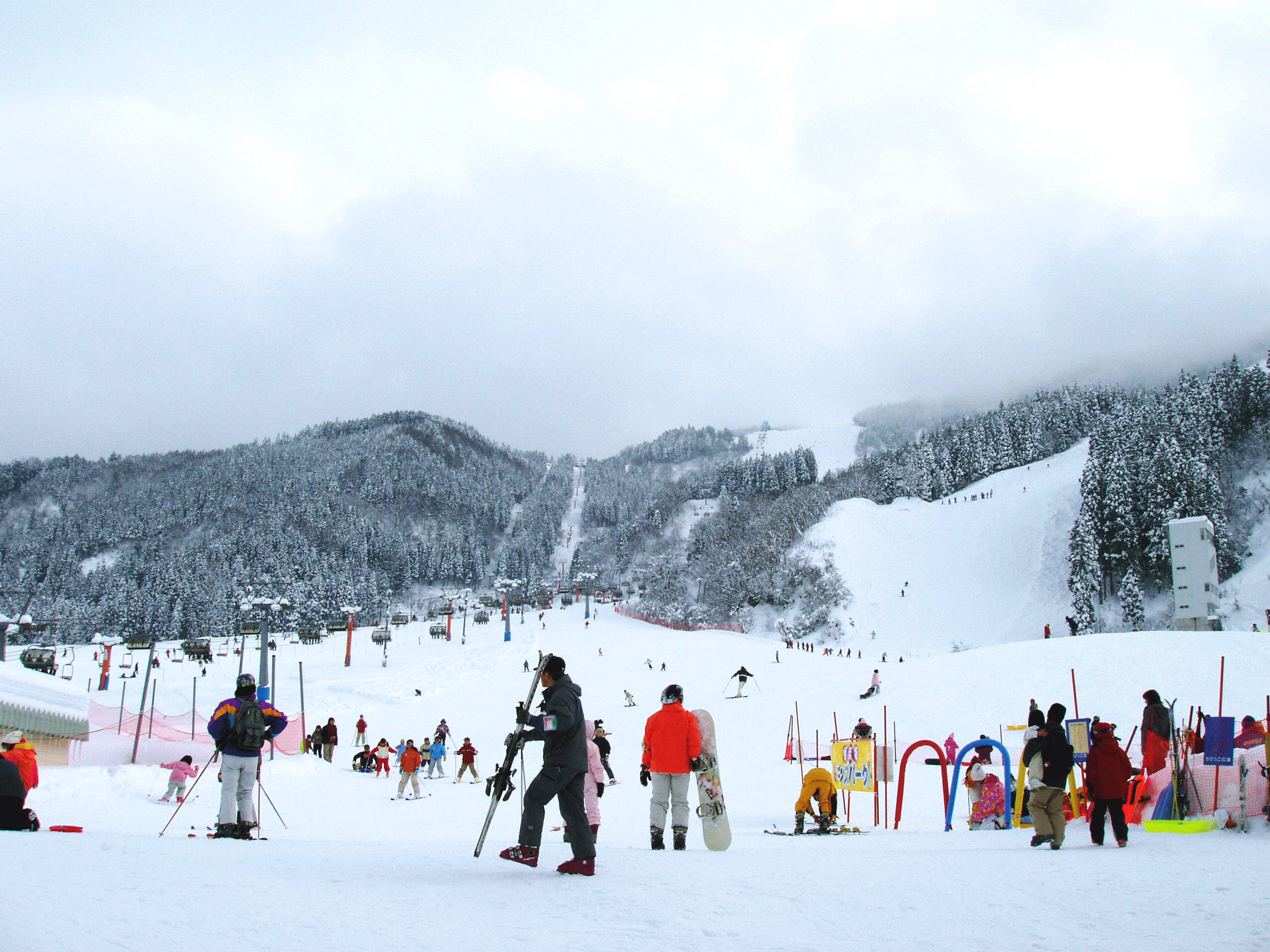 Tateyama Sanroku Gokurakuzaka Ski Area, Japan.